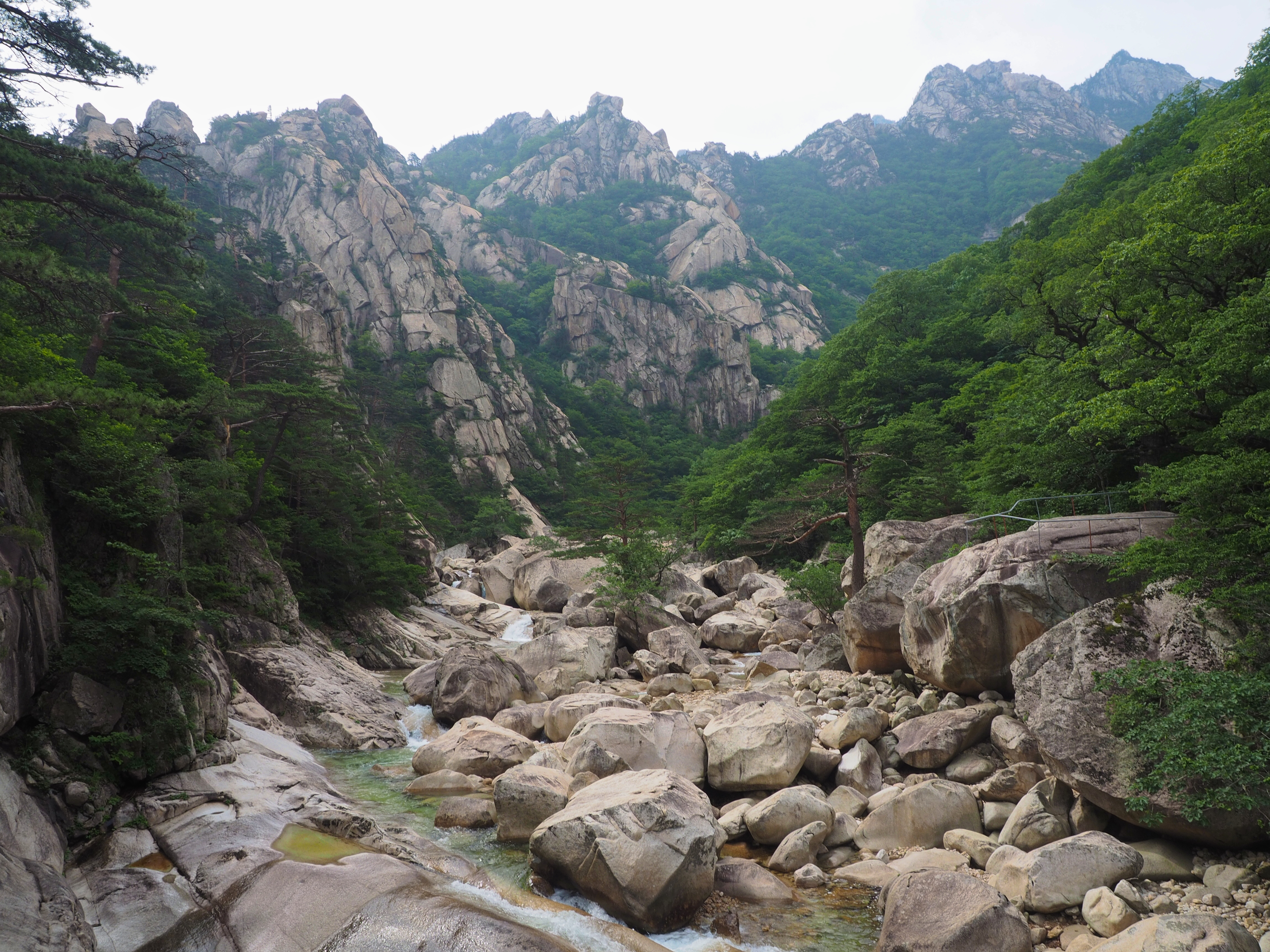 Kumgangsan National Park